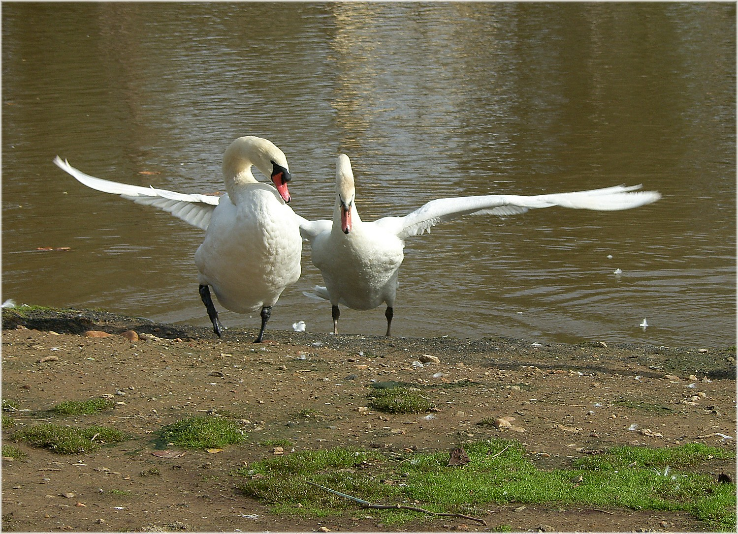 Cisne en Cividás, Serantes, Oleiros. Na lagoa de Mera, municipio de Oleiros (Coruña)